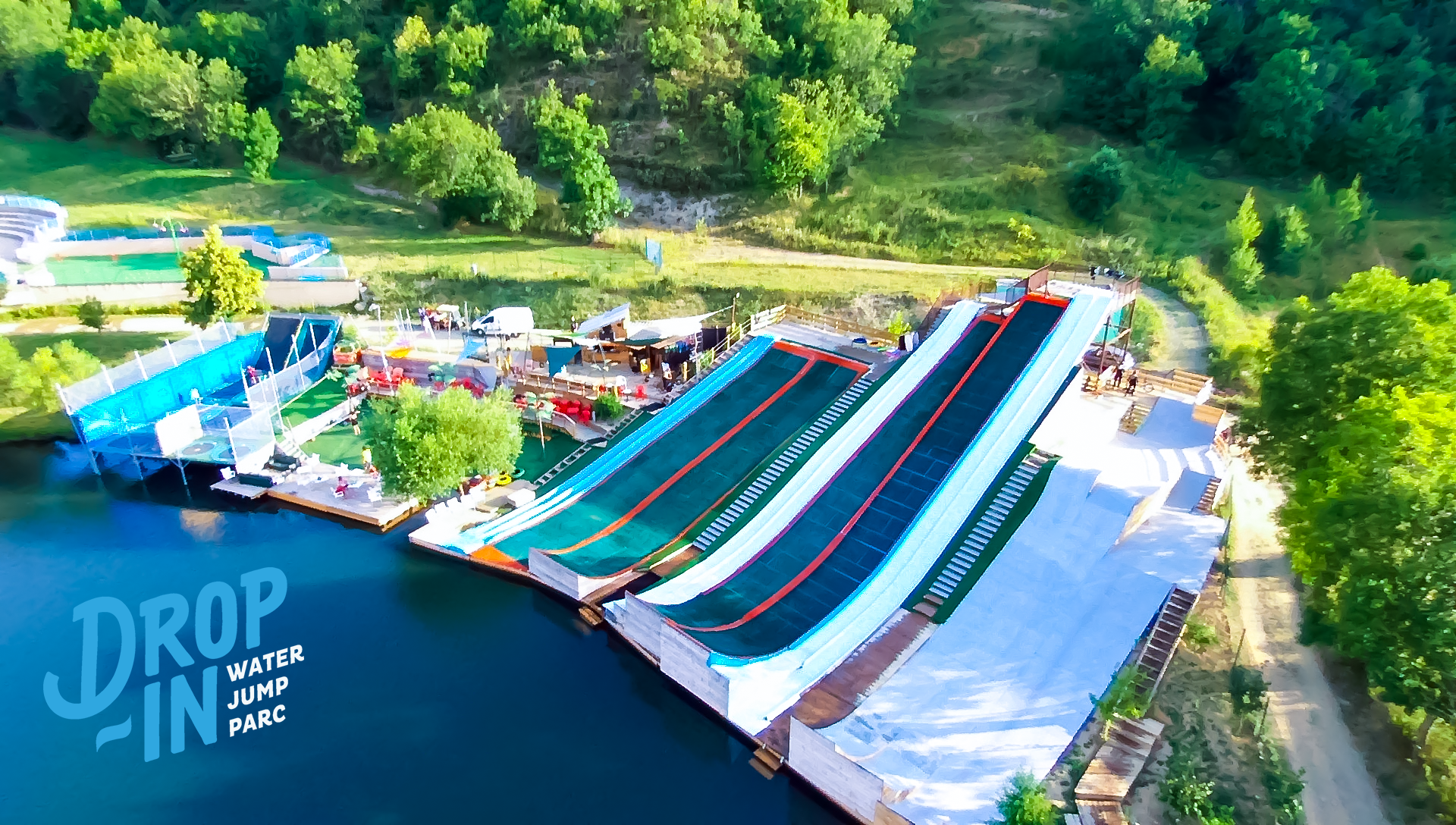 Base du Drop-in Cerdanya Water Jump